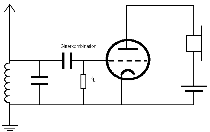 Audion ohne Rückkopplung